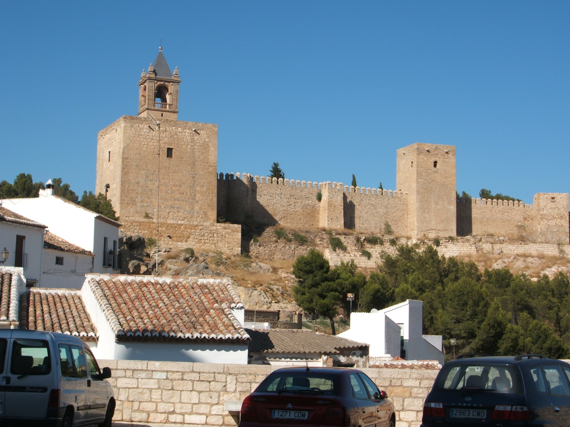 Alcazaba